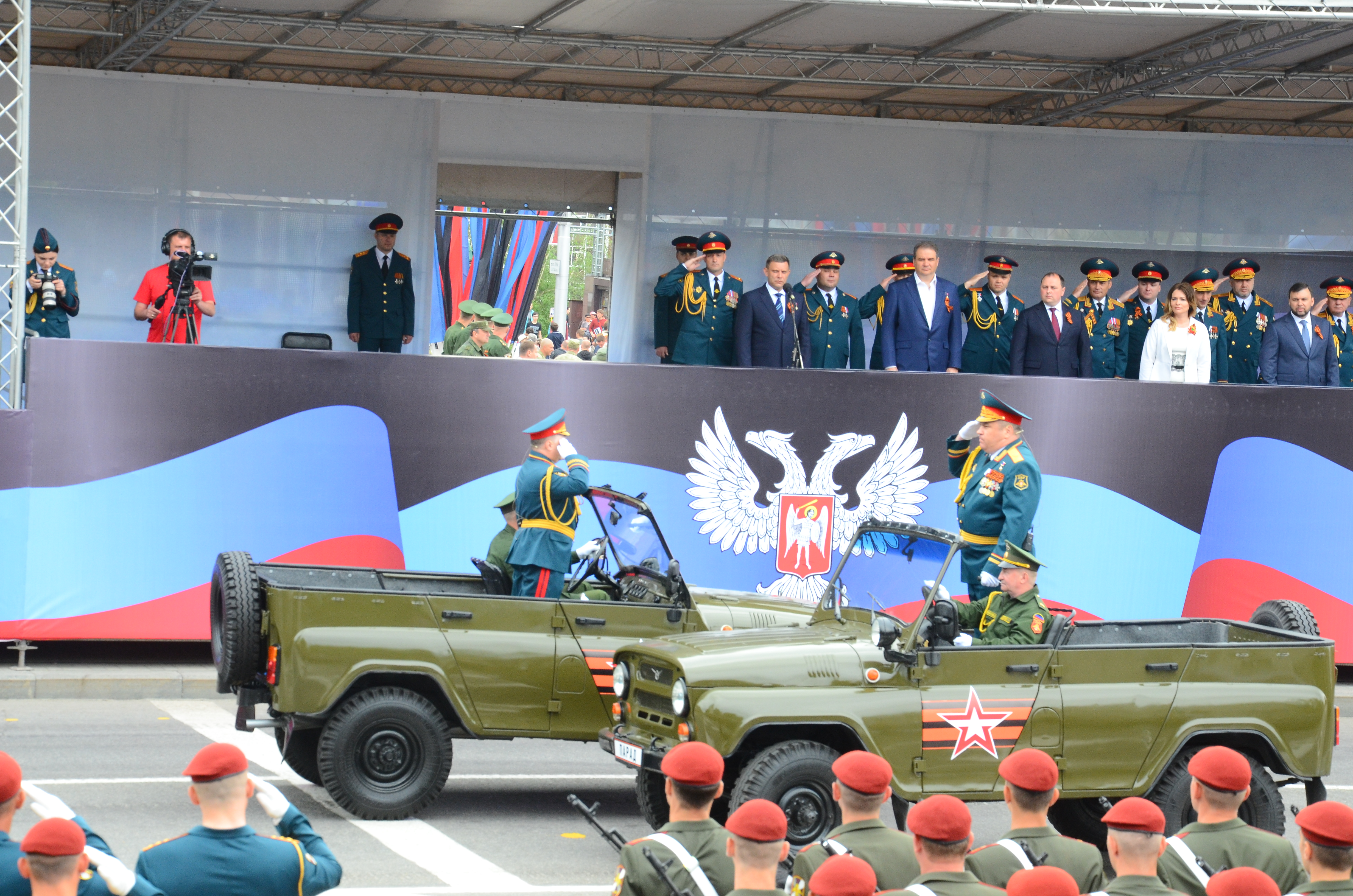 День Победы в Донецке